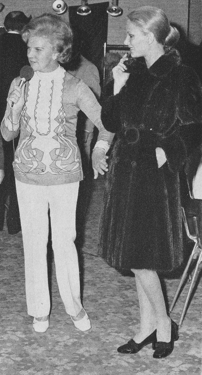 Miss Germany 1973 im Nerzmantel. In Räumen der Firma Kanada-Pelze, Ludwig Kuhlow. 22. Etage des Arabella-Hauses, München, anlässlich der Neueröffnung am 2. September 1973. Die Schwerpunkte der Pelzkonfektionsmodenschau lagen auf Bisam-, Waschbär- und Nerzkonfektion. Am Mikrofon die Fernsehmoderatorin Anneliese Fleyenschmidt. Von links: Anneliese Fleyenschmidt; Miss Germany 1973 Ingeborg Martin.